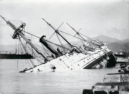 中文（香港）: 1906年9月18日香港丙午風災中，英國皇家炮艦鳳凰號失事擱淺；明報轉載香港海事博物館。